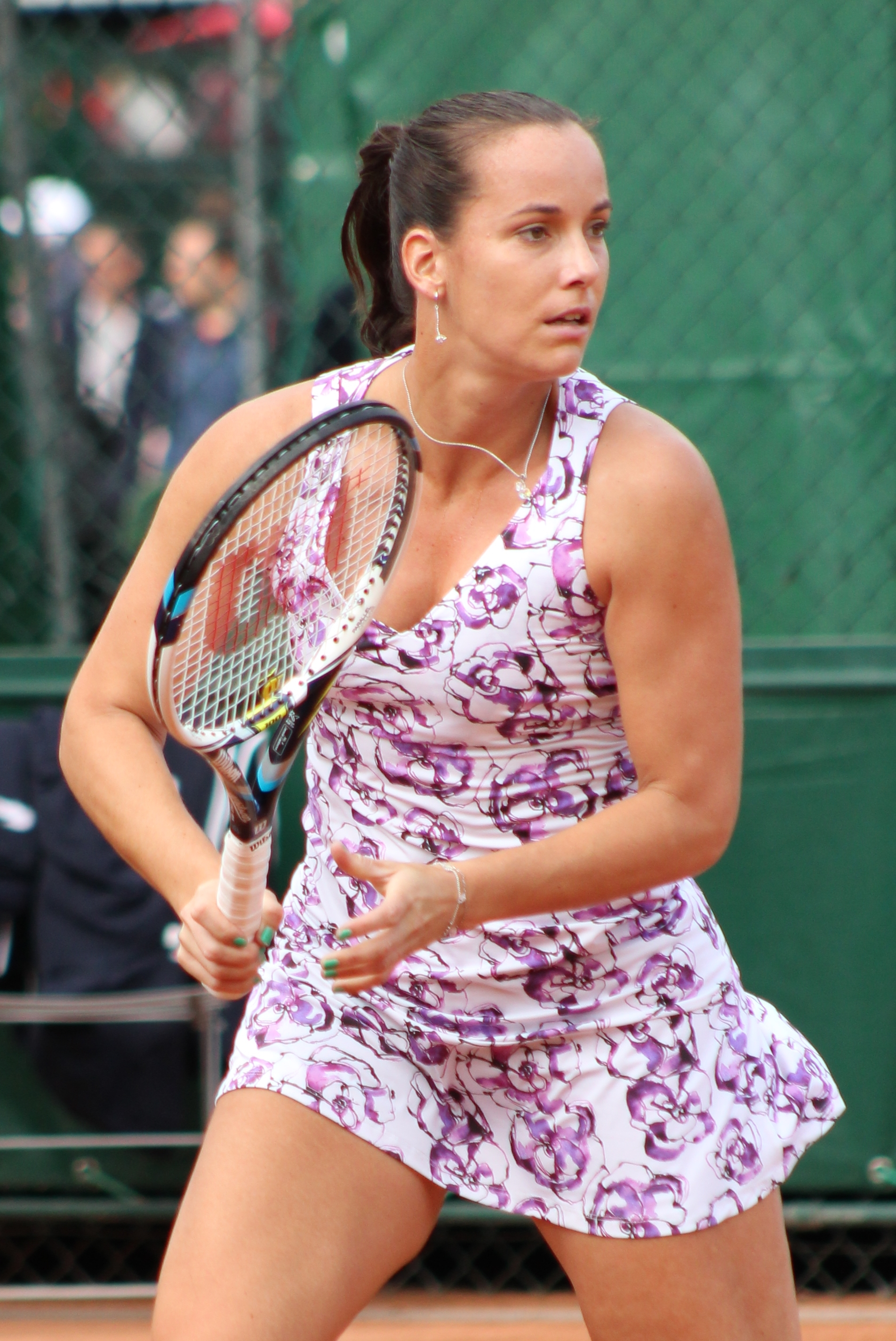 Gajdosova RG15 (9)